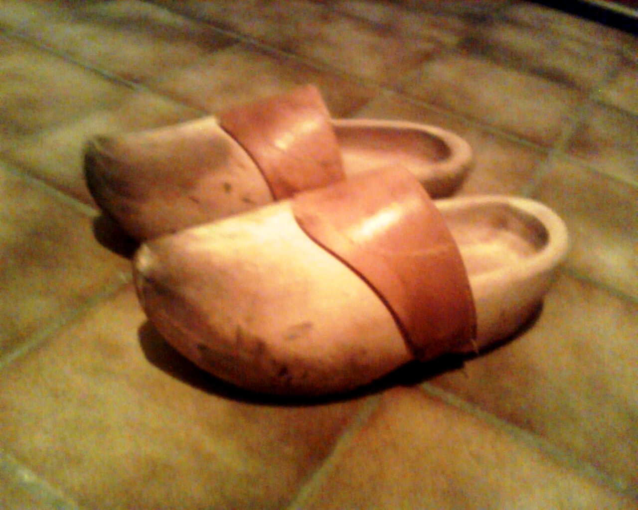 Nedersaksies: Kloompn met nen learn baand. Tweantse tripkloompn.